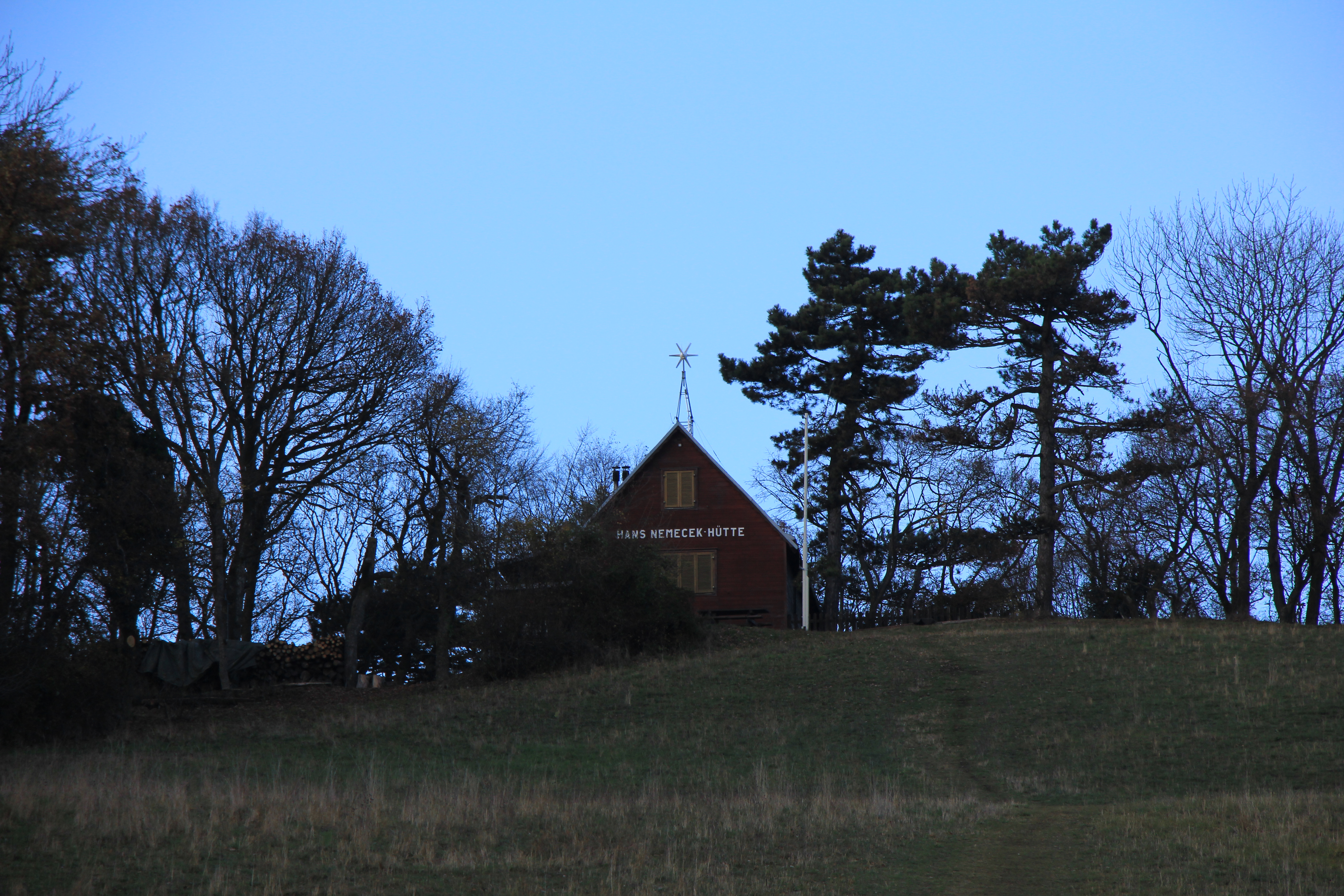 Eindrücke im Naturpark Föhrenberge. Hans Nemecek-Hütte oberhalb der Gießhübler Weide auf dem Gebiet der KG Weissenbach bei Mödling